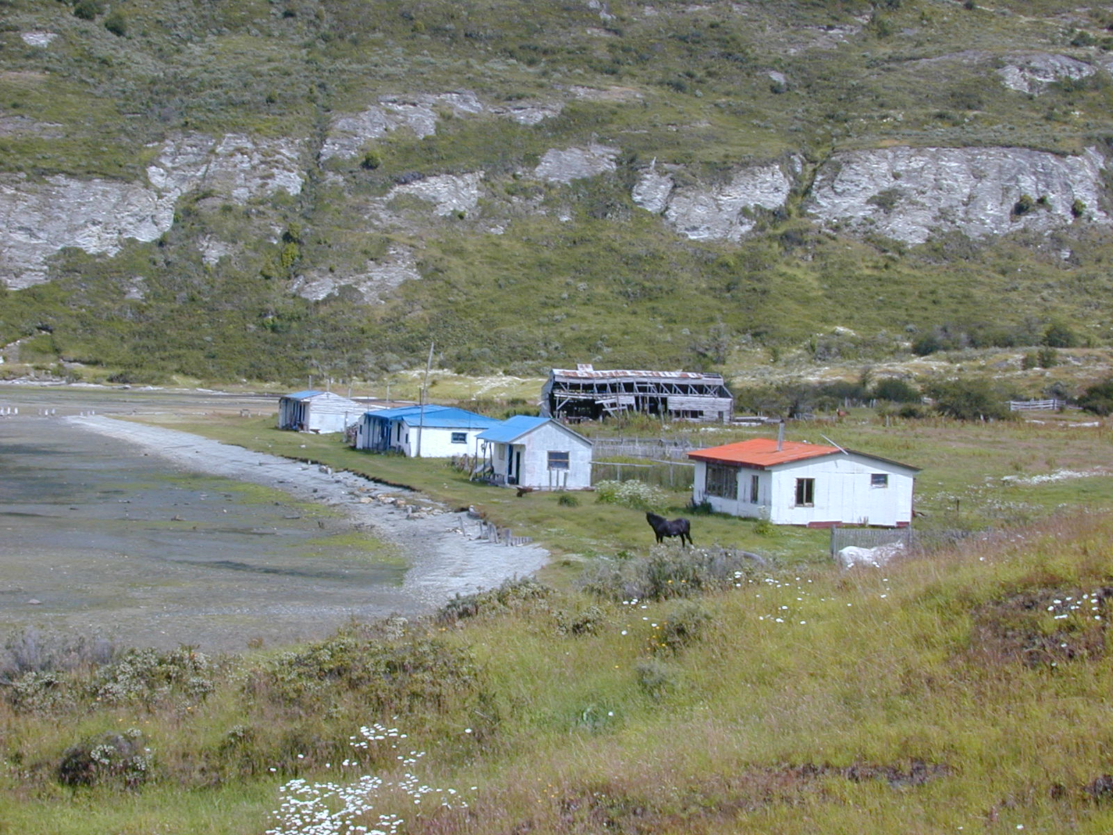 Vista de lo que queda de las antiguas casas de la ex Estancia Yendegaia, en la Bahía del mismo nombre. Costa sur de Tierra del Fuego, Chile.